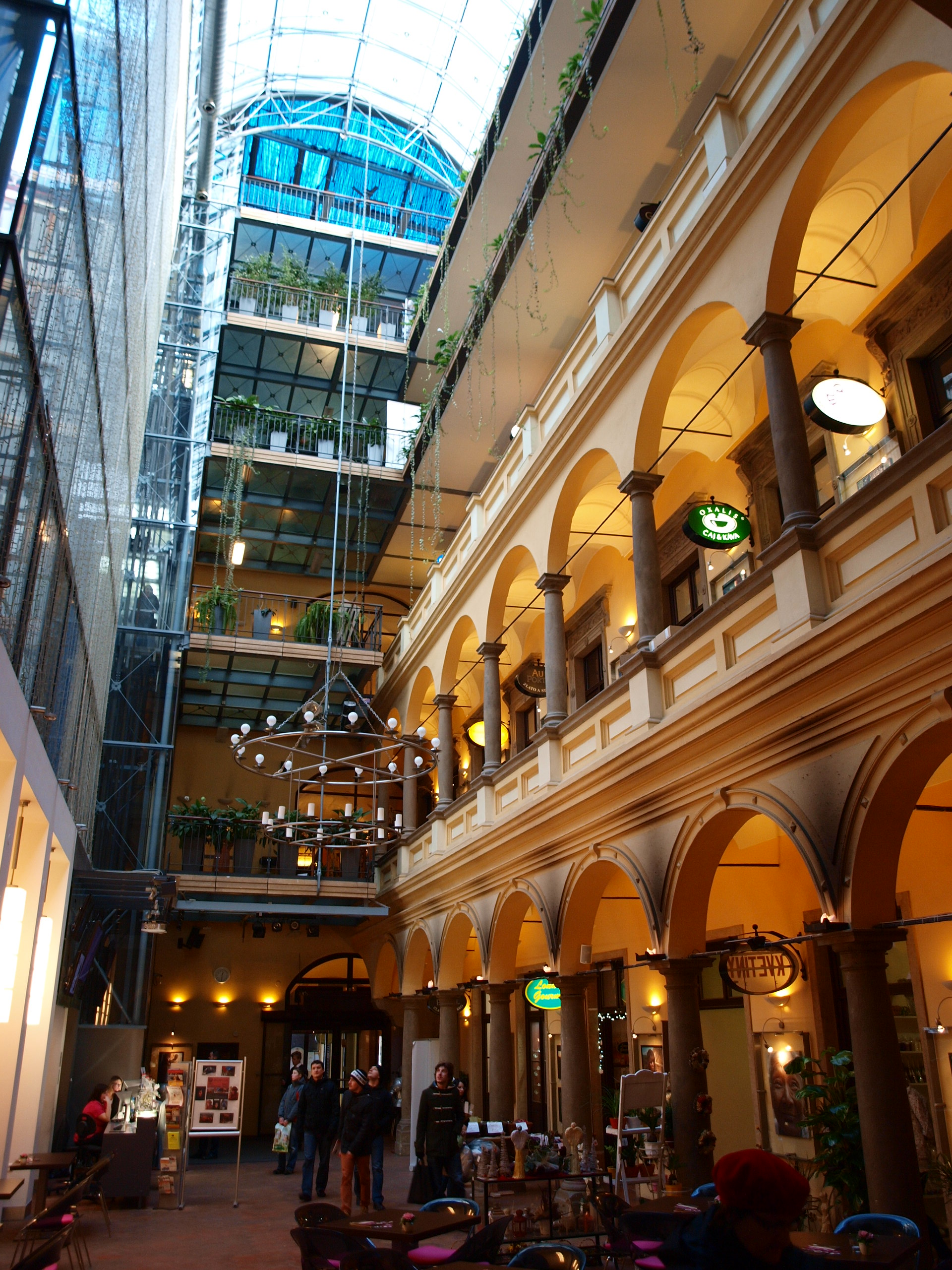 Dům pánů z Lipé, Brno